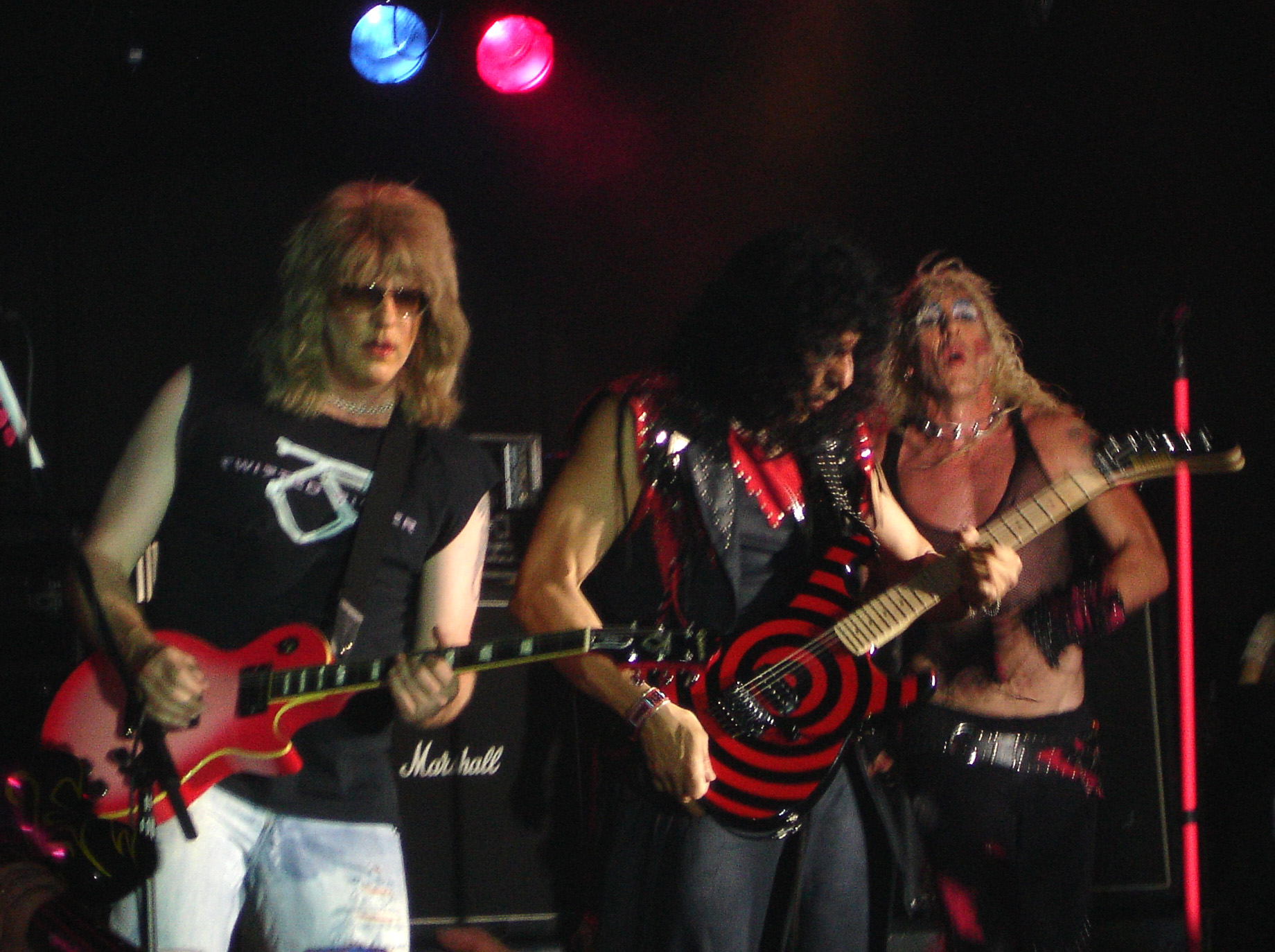 Twisted Sister performing in Manchester, June 2006